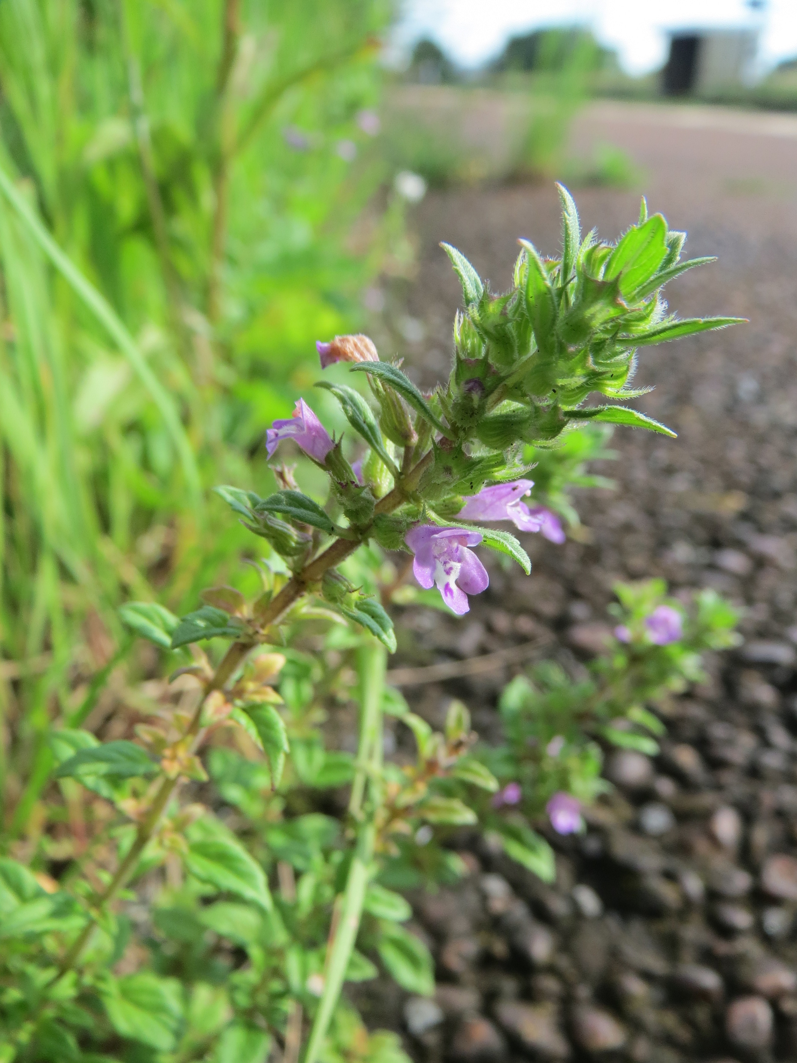 Feld-Steinquendel (Acinos arvensis) am Bahnhof Wiesental